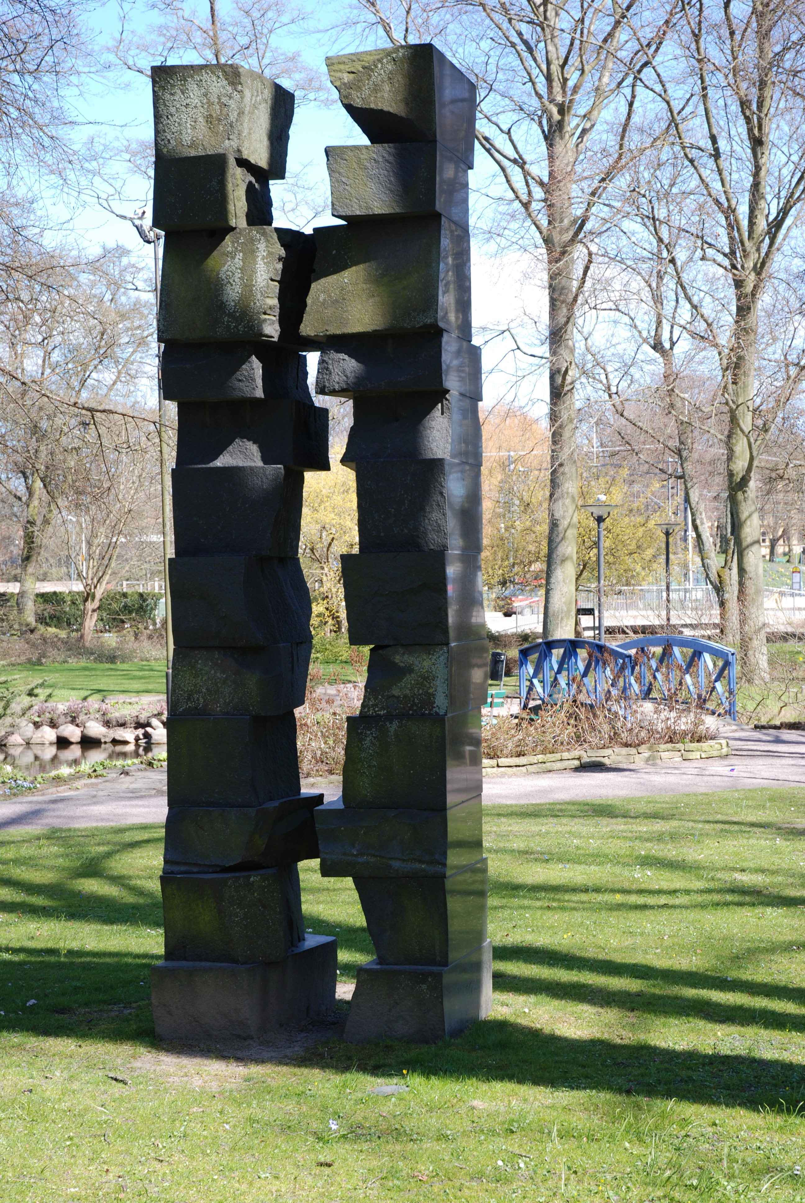 Takashi Naraha´s Mandala, diabase, Kalmar, Sweden